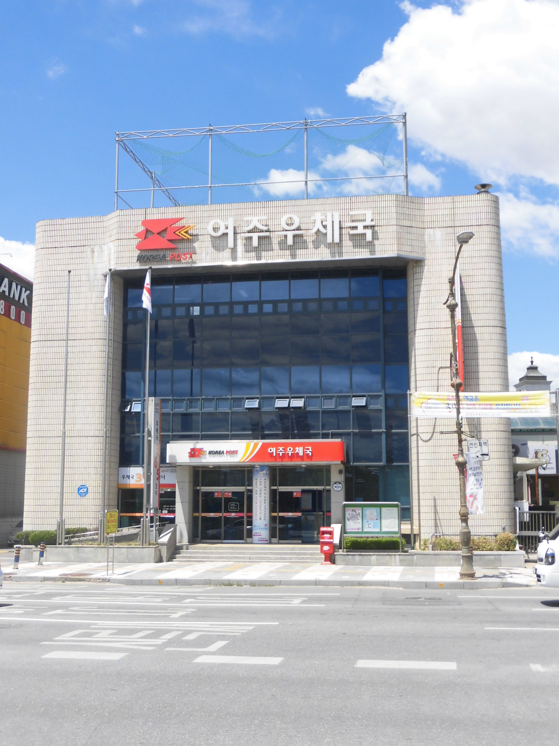 경기도 여주시에 있는 여주우체국